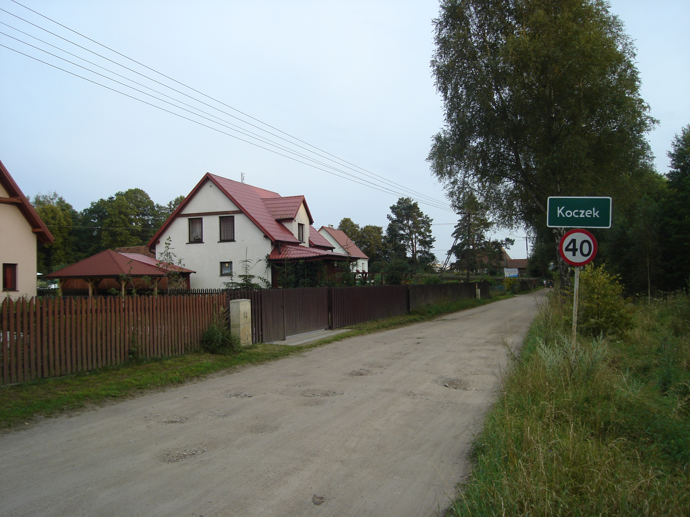 Wieś Koczek